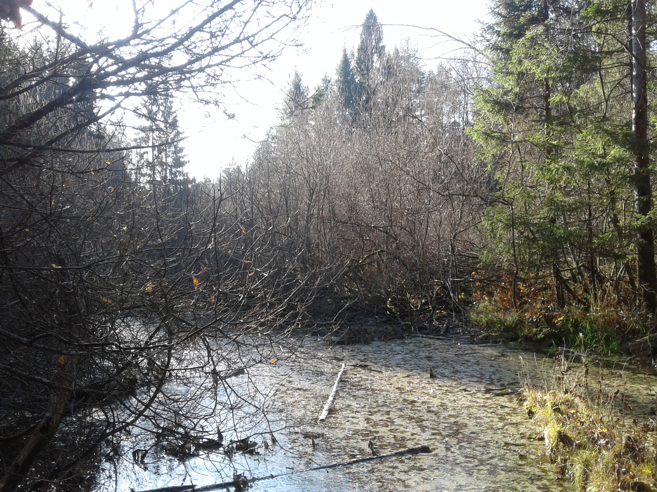 Осенний снимок реки Любосеевка в районе бывшей запруды (мельницы) в нескольких километрах к северу от Фрязино, около пересечения с трассой бывшего Хомутовского тракта